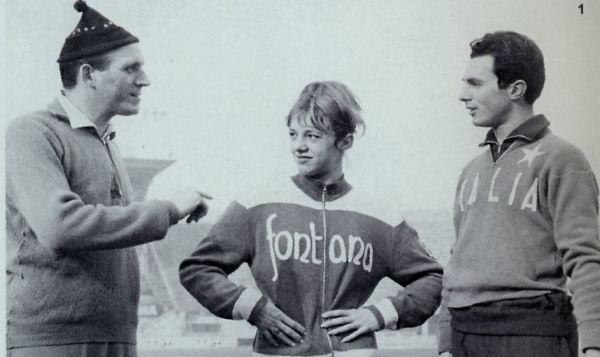 Pino Dordoni, Donata Govoni e Livio Berruti in una foto degli anni 1960